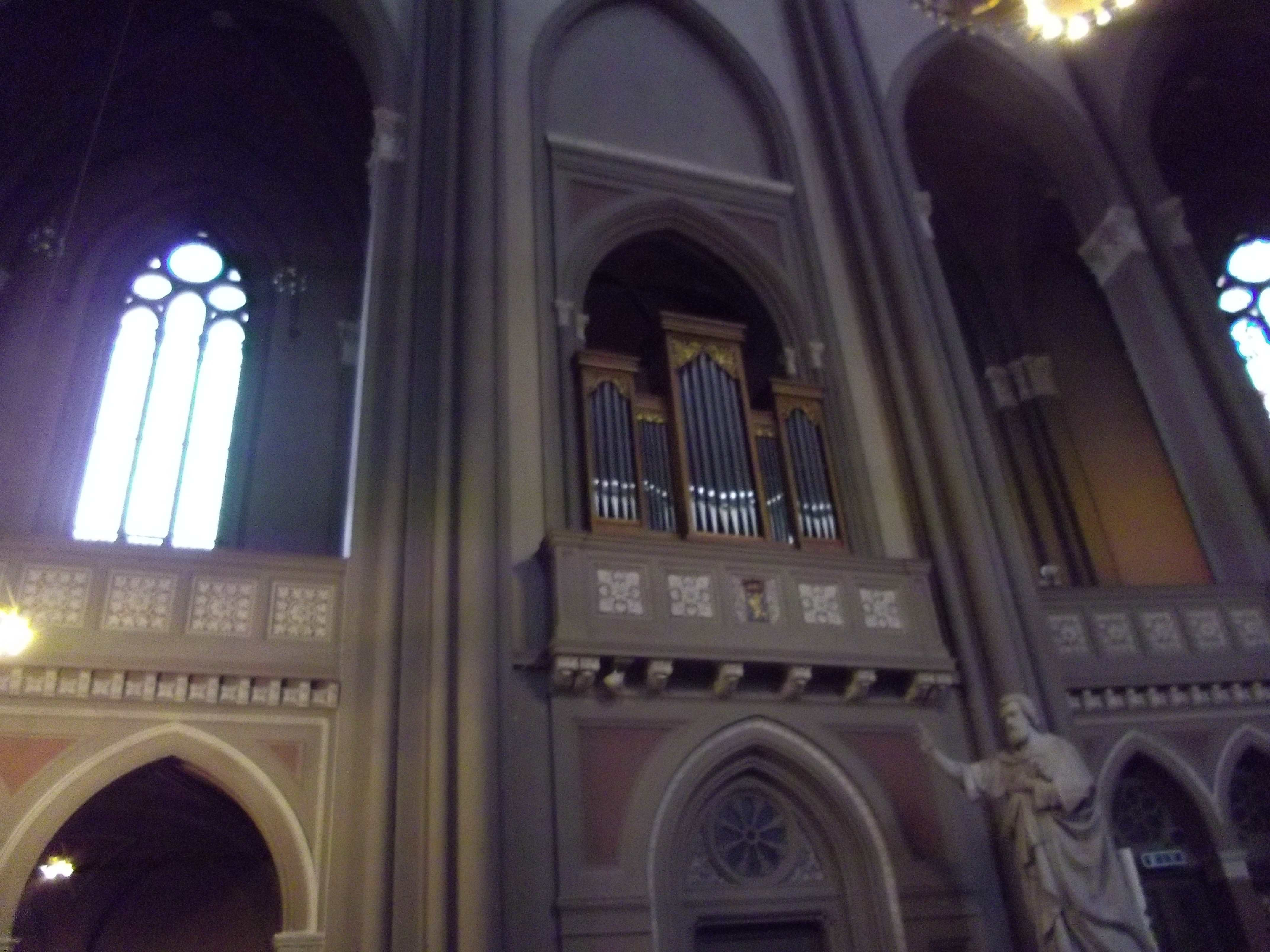 Chororgel der Marktkirche Wiesbaden